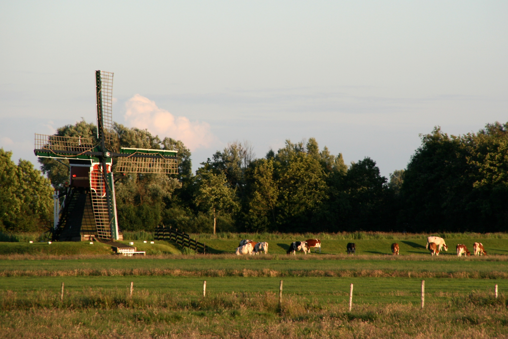 Kaag: De Kager